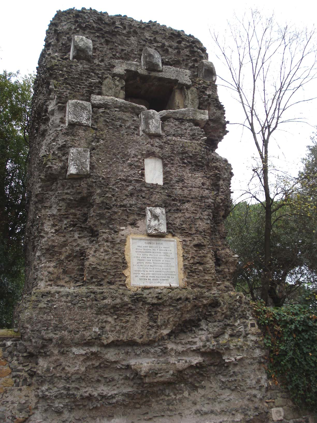 Капо ди Бове